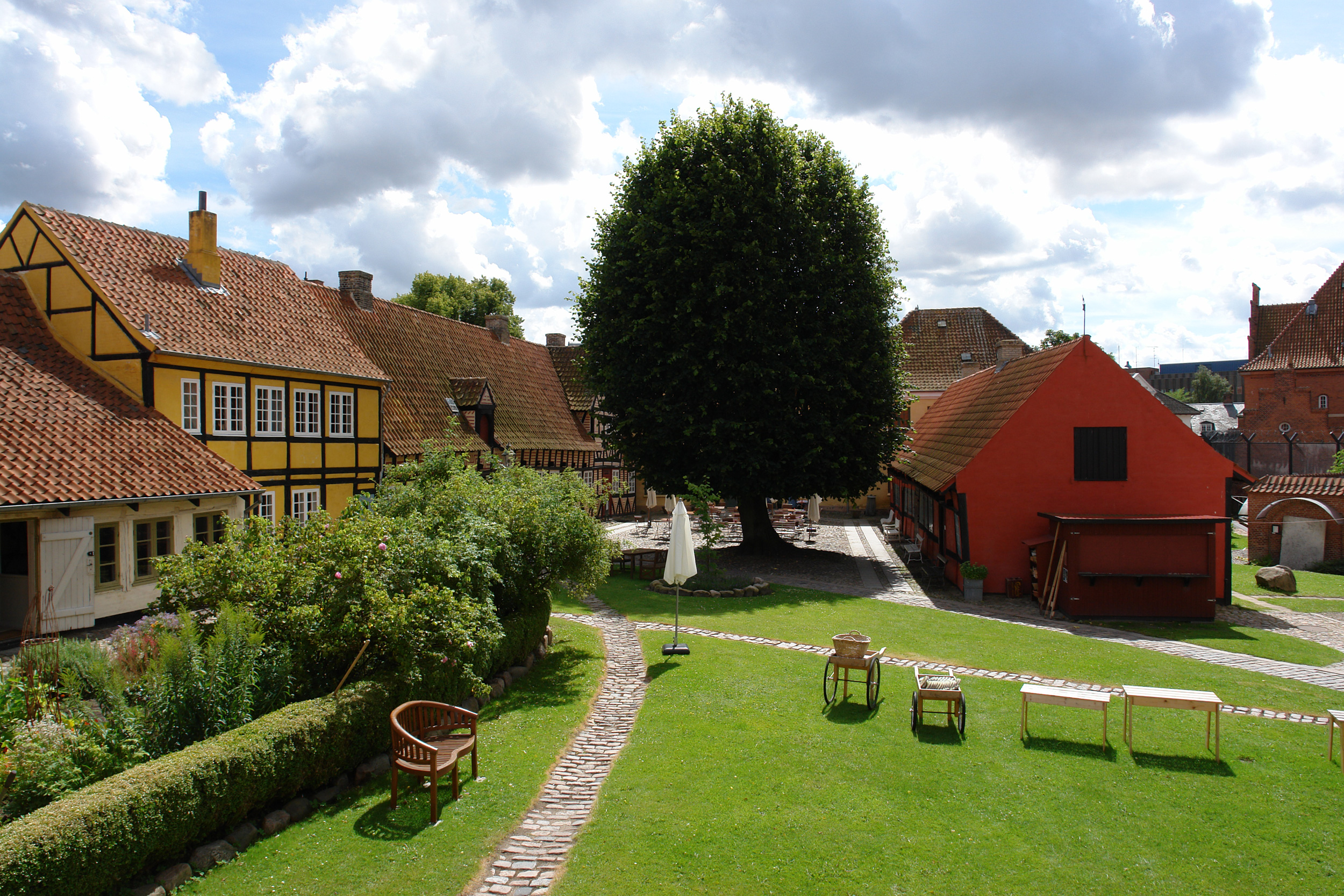 Holbæk Museum: Klosterstræde 12-14-16 (18. Jh.) - das rote Baghuset (um 1670), steht unter Denkmalschutz